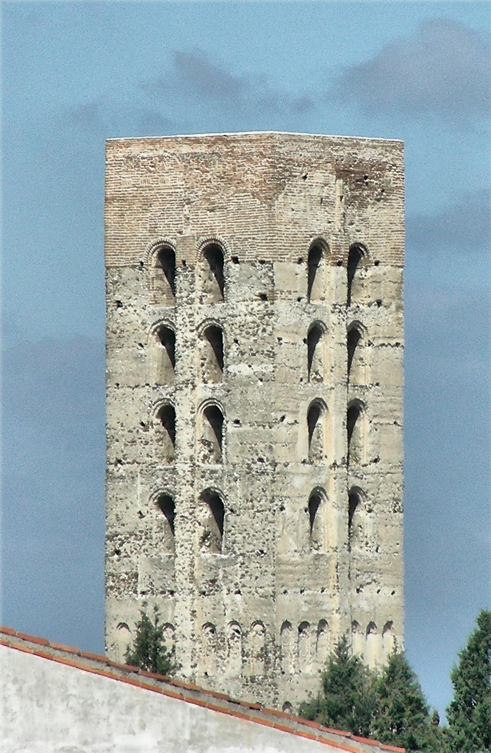 Torre mudéjar de San Nicolás en Coca, provincia de Segovia, Castilla y León, España.